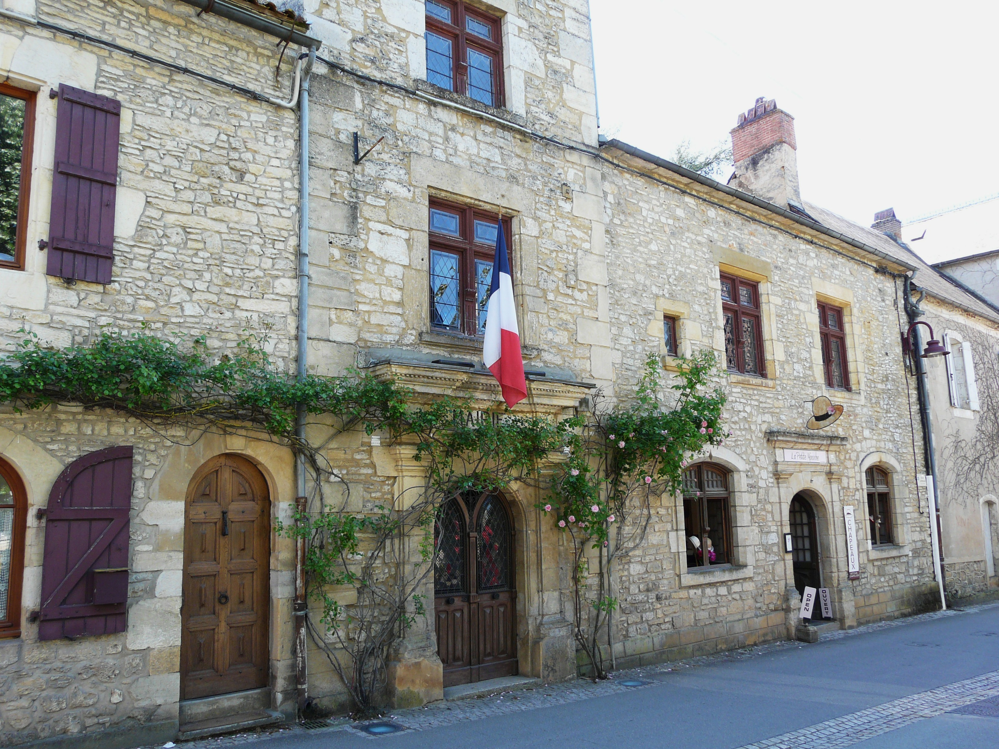 L'ancienne mairie de Daglan, Dordogne, France.